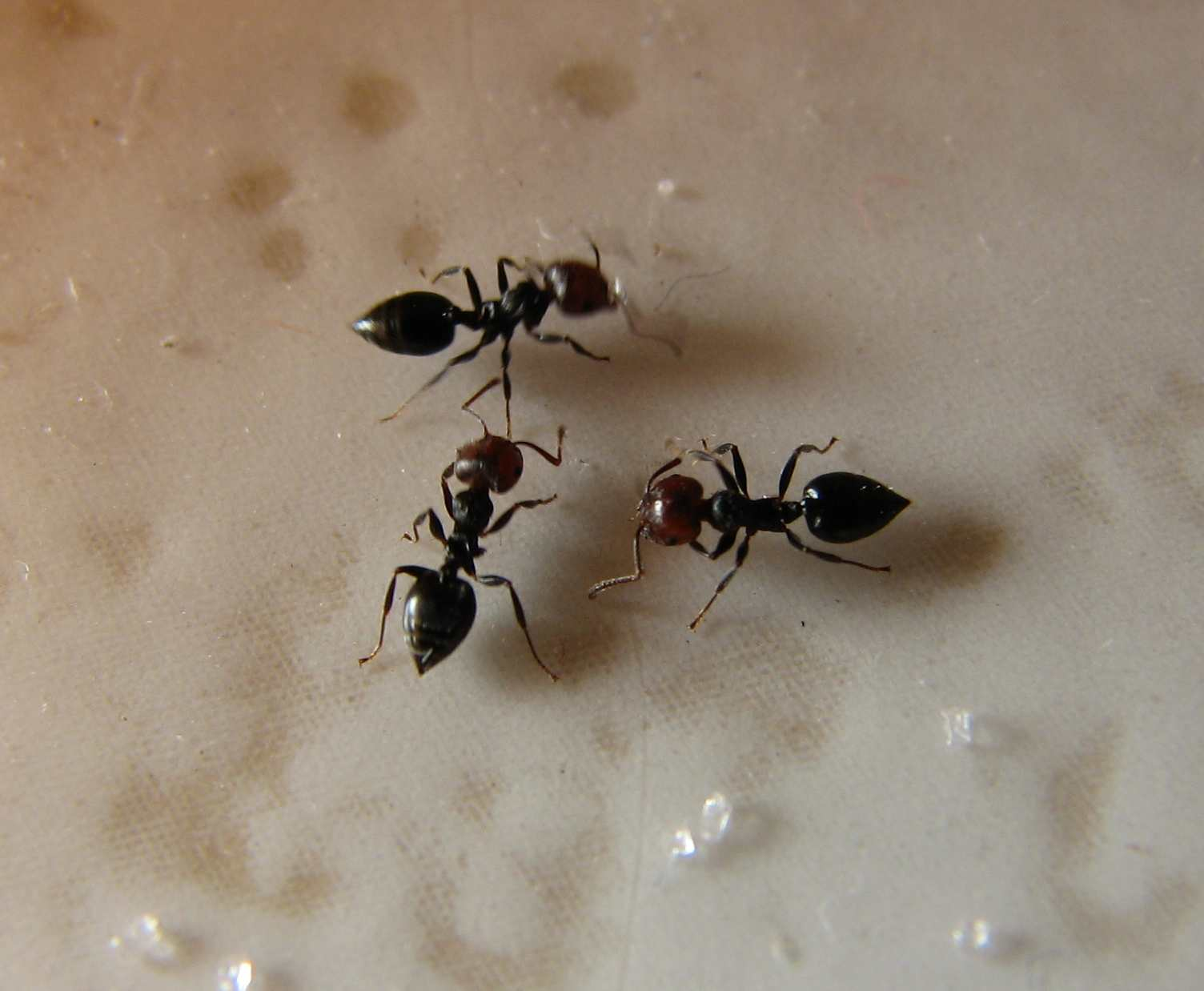 Ameisen in Italien (Rosolina Mare) Crematogaster sp., det. by D. Yanega, July 2007